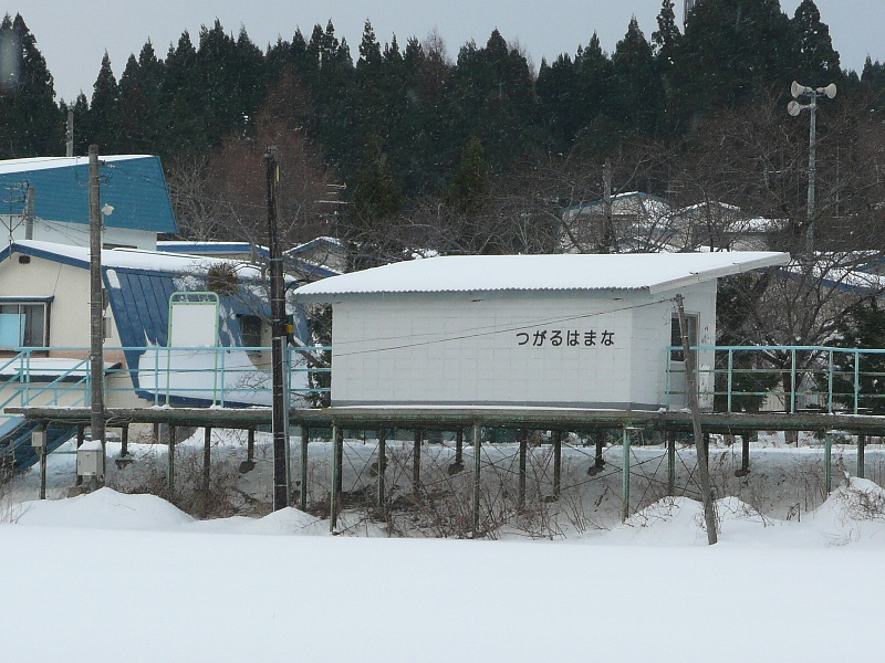 Tsugaru-Hamana station